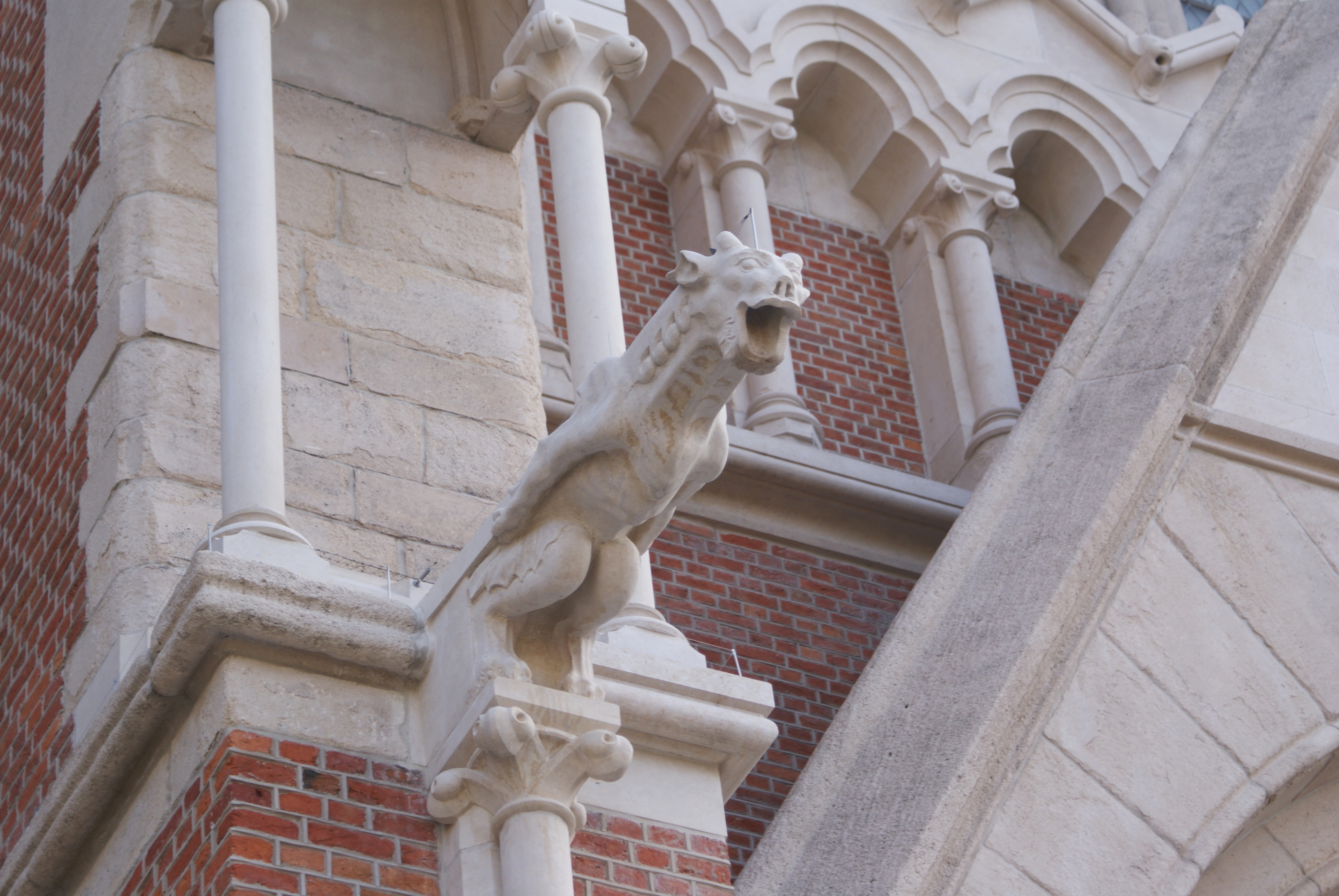 Sint-Willibrorduskerk te Antwerpen (Seefhoek) - Waterspuwer